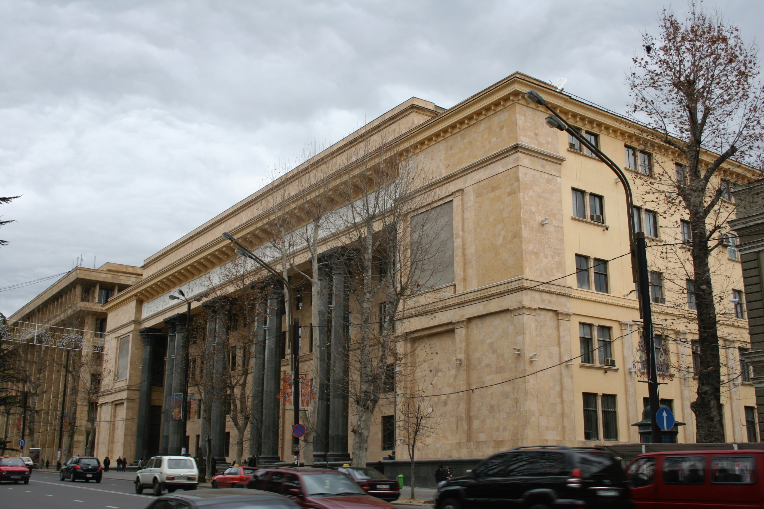 იმელის შენობა, თბილისი, 2007 წ. IMEL building on Rustaveli Avenue is one of Tbilisi's most significant pieces of Socialist Classicism. Built in 1934-1938.